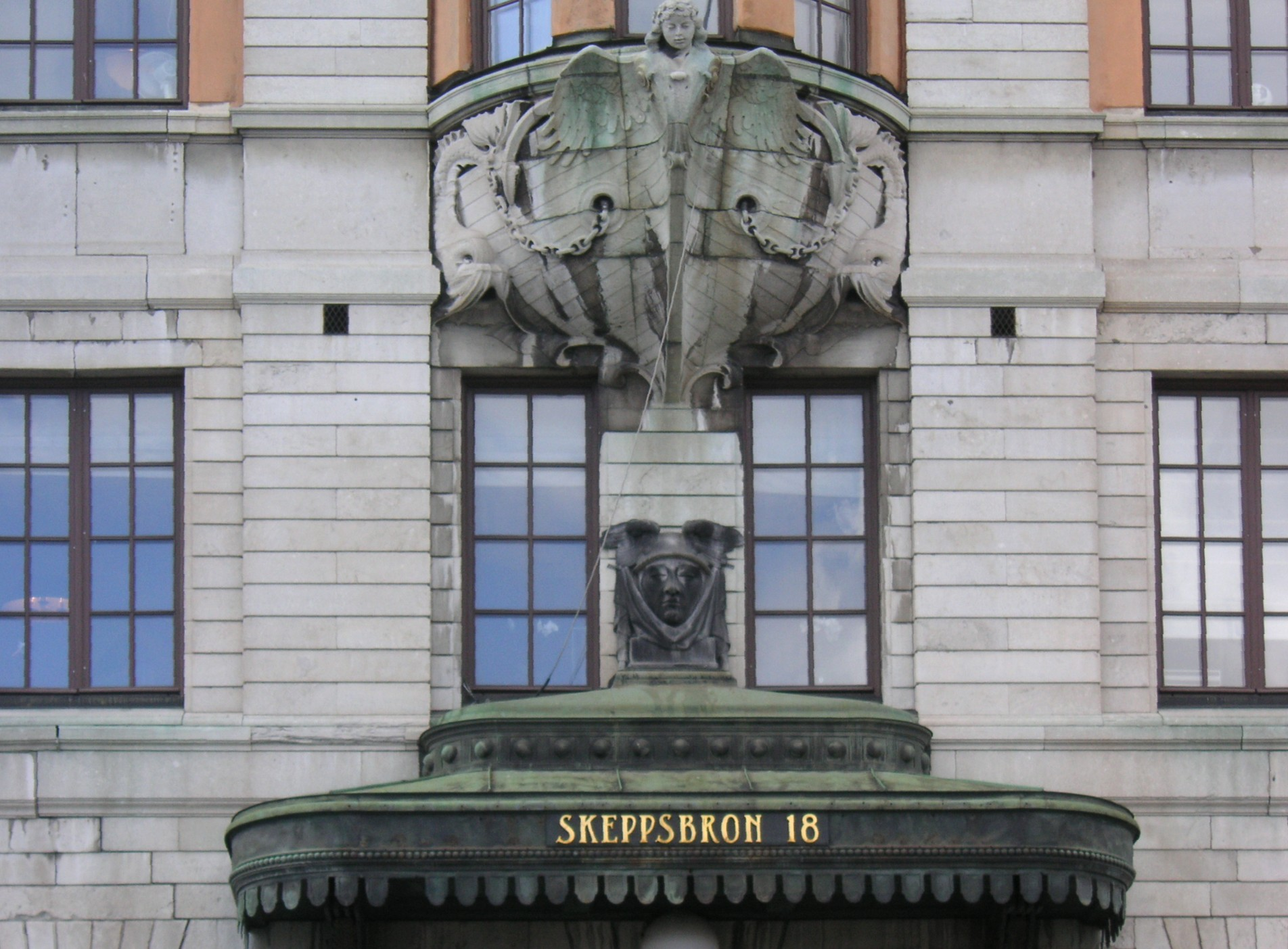 Skeppsbron 18 i Stockholm, fasaddetalj